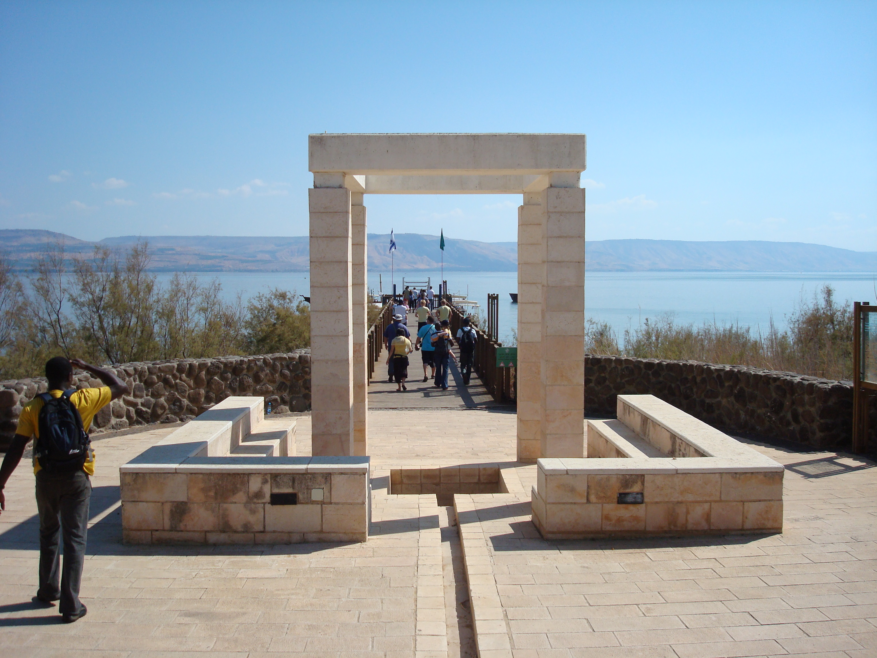 Причал около раскопок в Капернауме, Израиль.